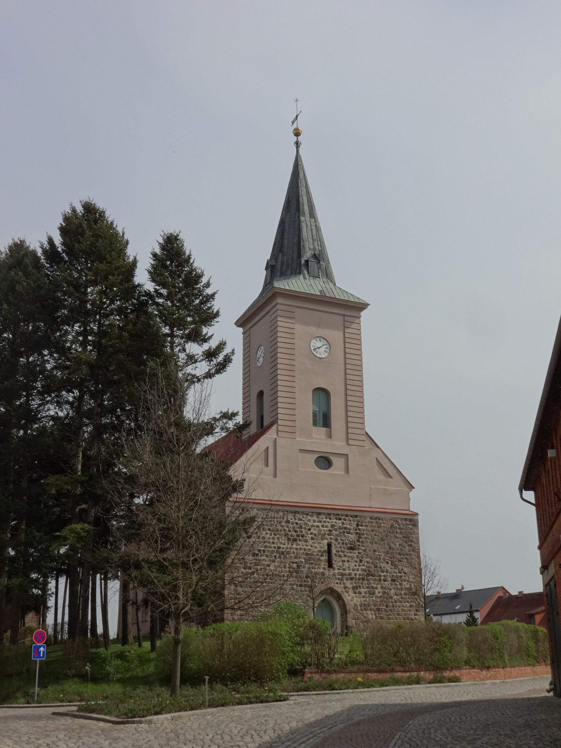 Die evangelische Stadtkirche Biesenthal ist ein Sakralbau aus dem 13. Jahrhundert in Biesenthal im Landkreis Barnim (Brandenburg). Nach einem schweren Brand im 18. Jahrhundert, bei dem nur der Turm erhalten blieb, baute die Gemeinde das Bauwerk in den Jahren 1762 bis 1766 wieder auf. Im Innenraum befinden sich eine Dinse-Orgel aus dem Jahr 1859 sowie ein spätbarocker Kanzelaltar.